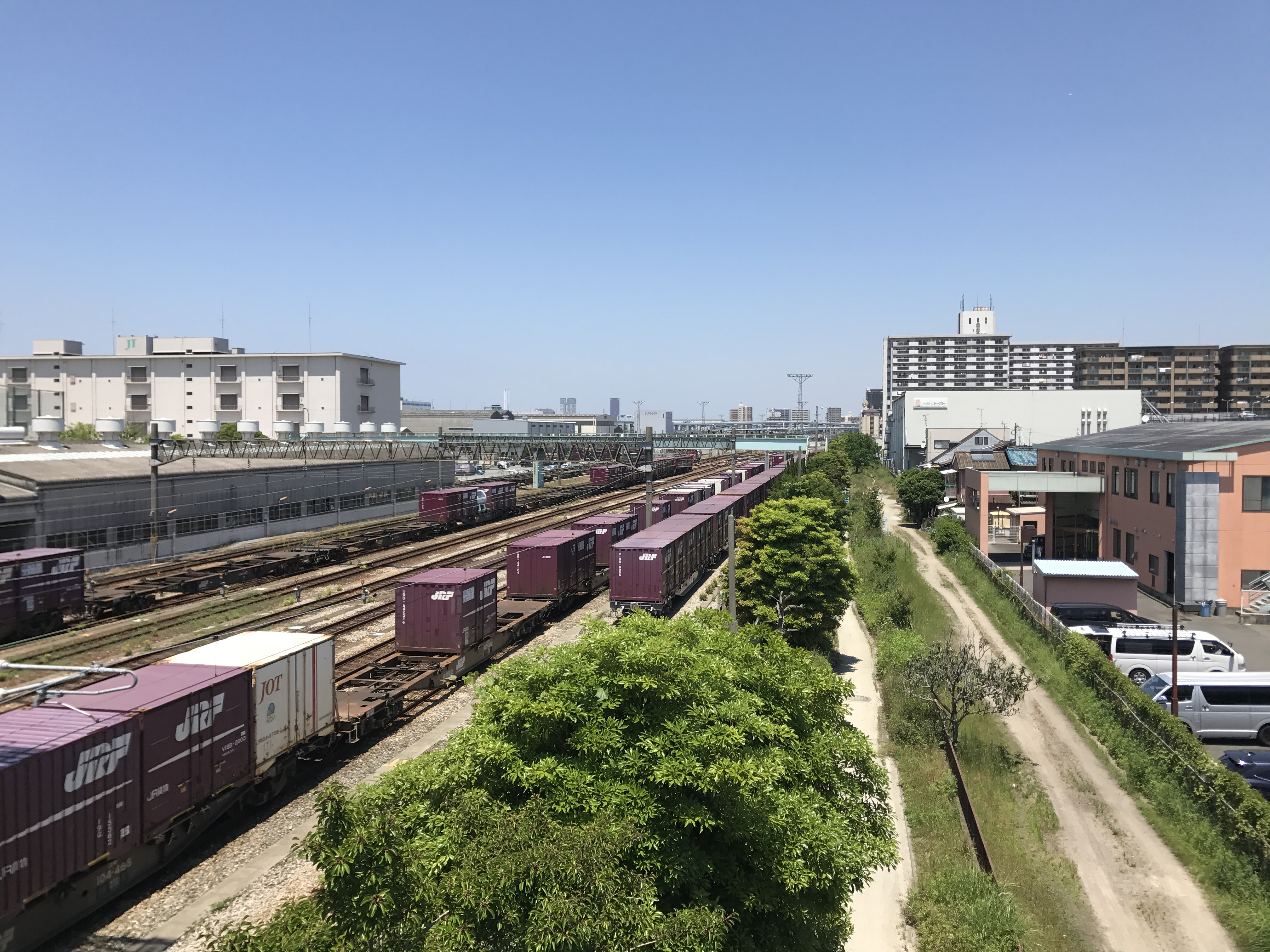 歩道橋より望む福岡貨物ターミナル駅構内